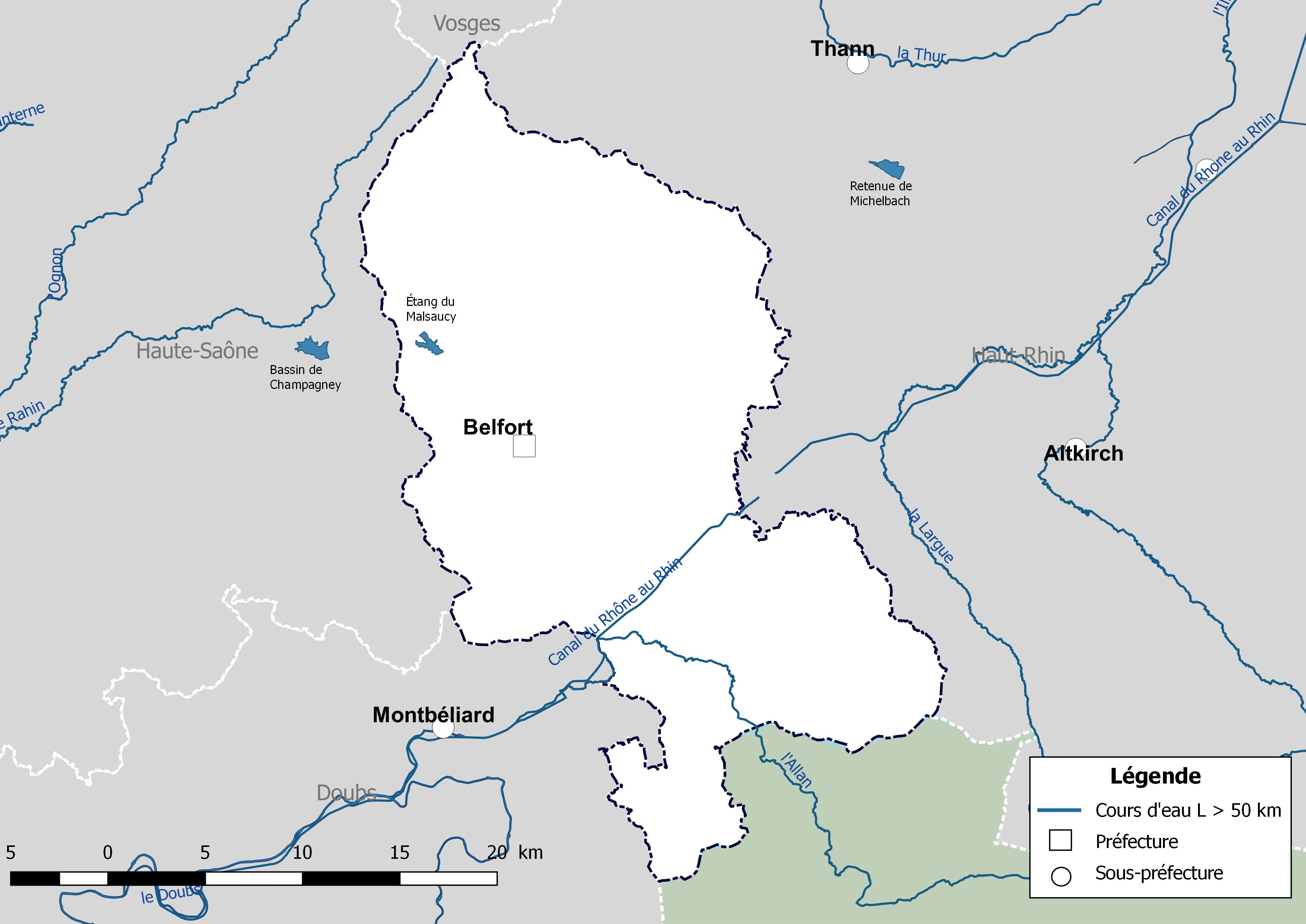 Carte des cours d'eau de longueur supérieure à 50 km drainant le département du Territoire de Belfort (France).